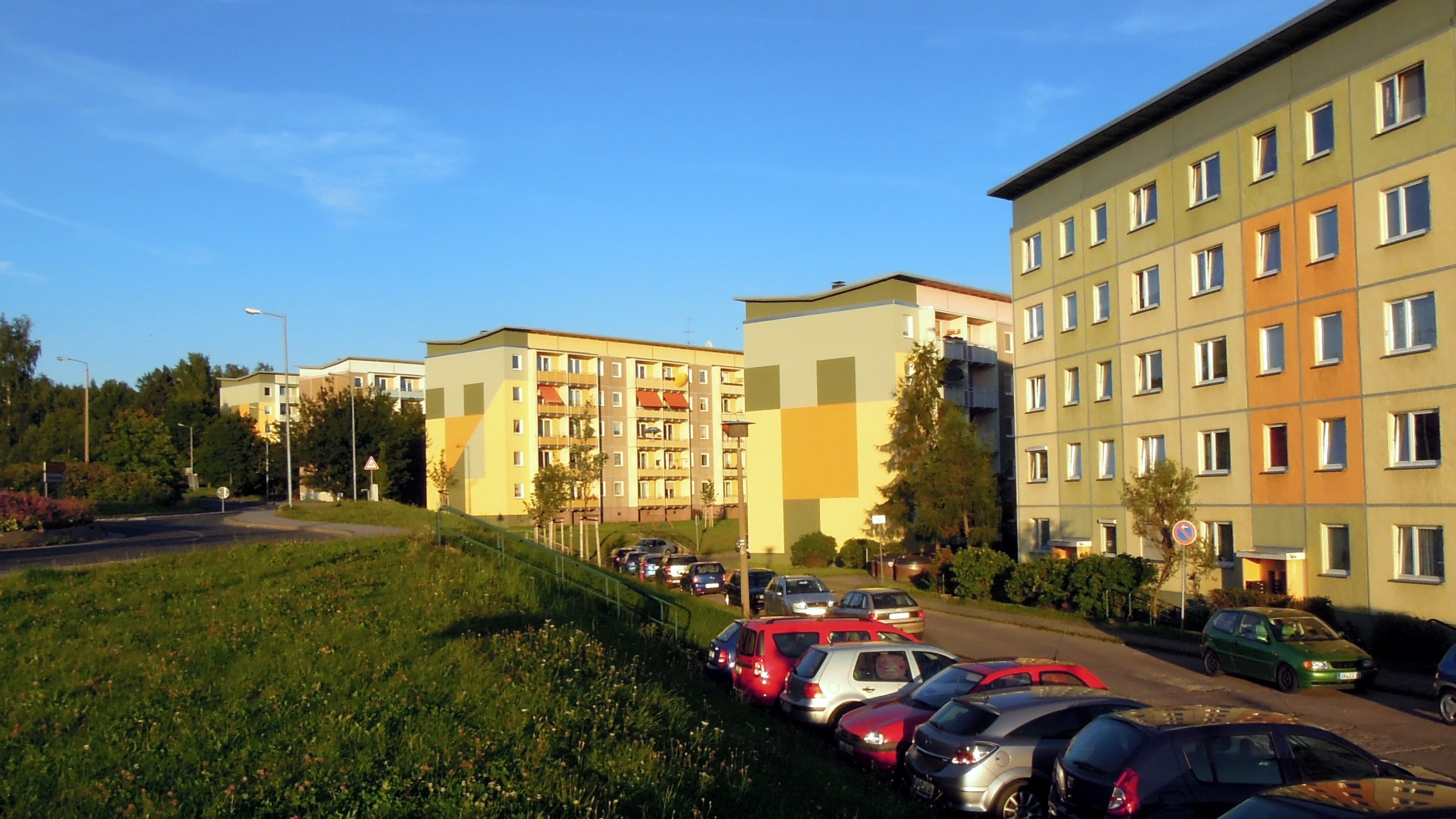 die fünf Wohnblöcke im Wohngebiet "Eichicht" in Ilmenau, Thüringen